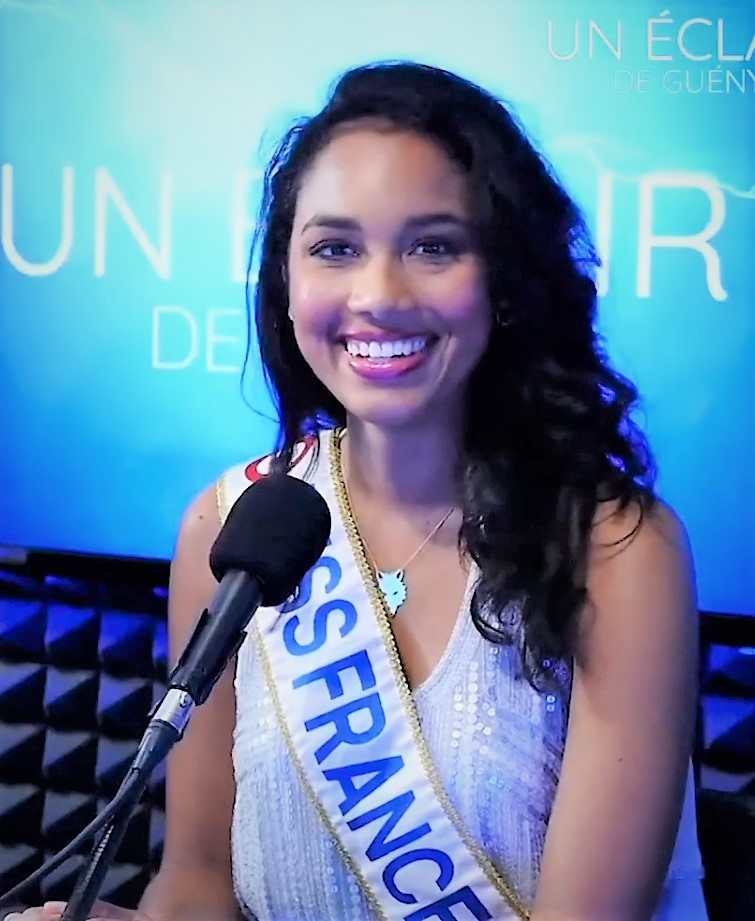 Clémence Botino (Miss France 2020): L'affaire George Floyd a déclenché une bombe à retardement" La foudre frappe sur VL ! Maxime Guény et sa bande agitent votre soirée, toujours avec un invité, et toujours en musique ! Retrouvez-nous sur : | Notre site : | Facebook : | Twitter : | Instagram : | Google +